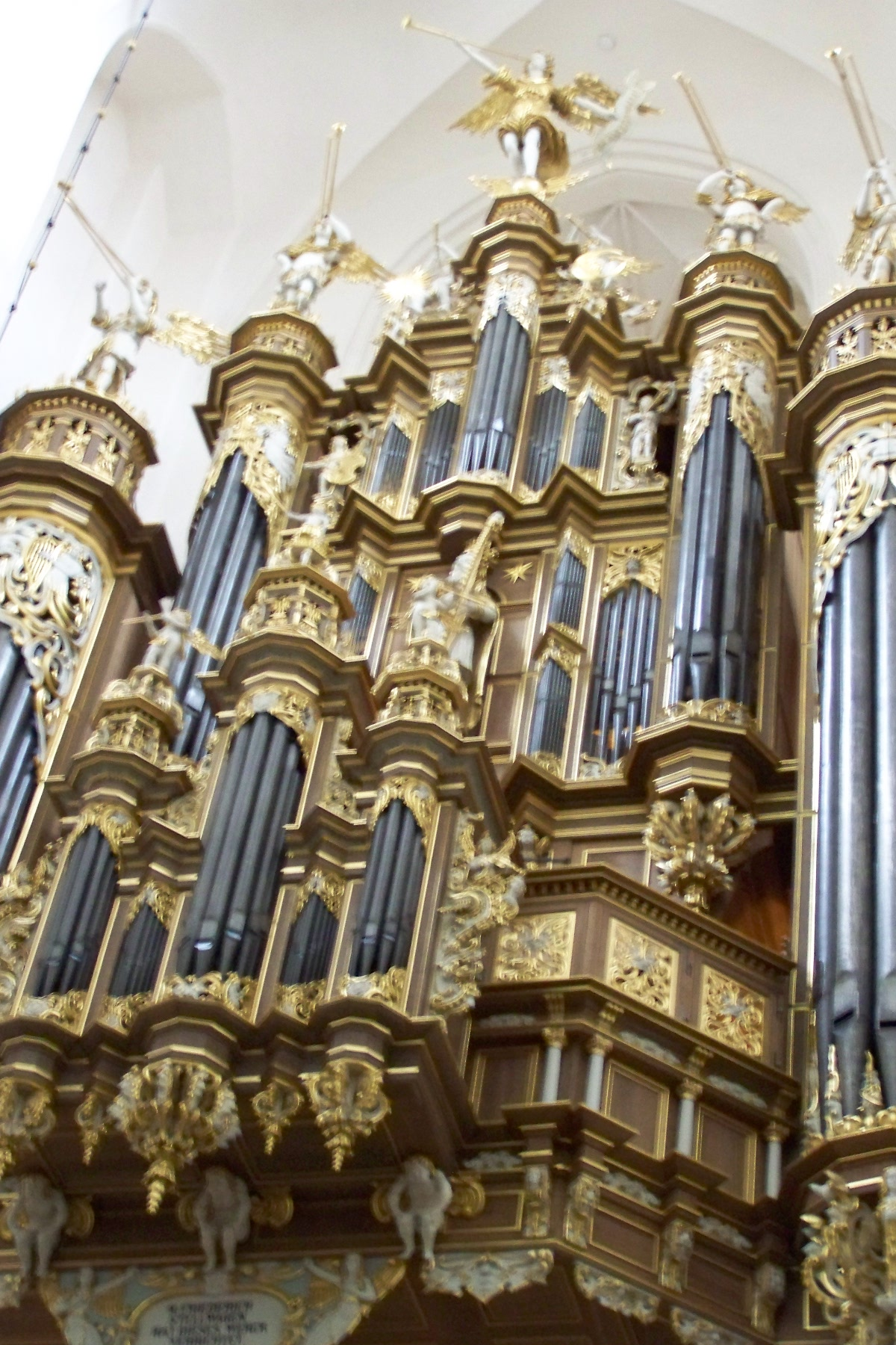 Stralsund, Marienkirche, Stellwagen-Orgel, Detail (2008-10-02).JPG